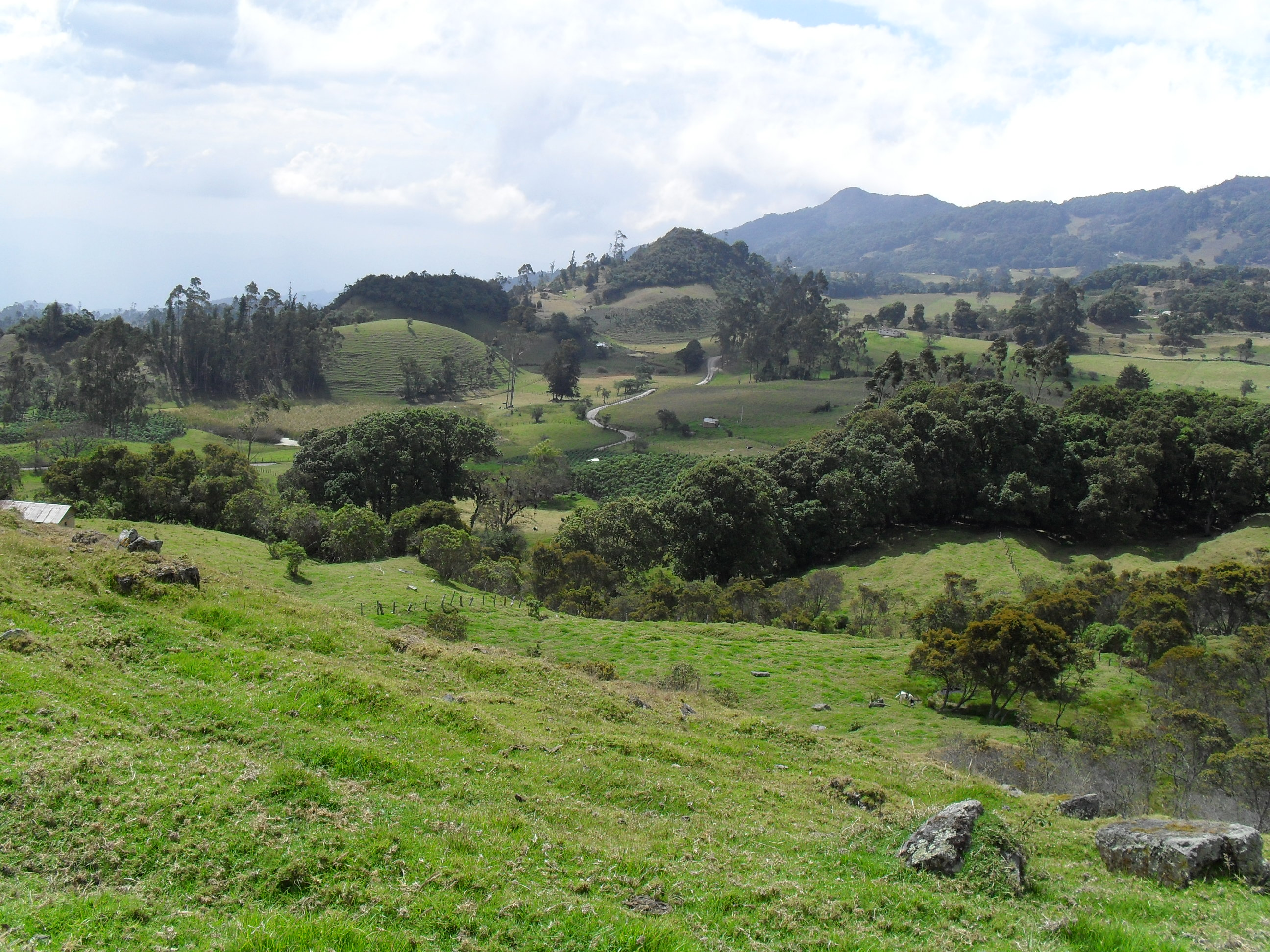 Paisaje típico del altiplano cundiboyacence en Boyaca Colombia